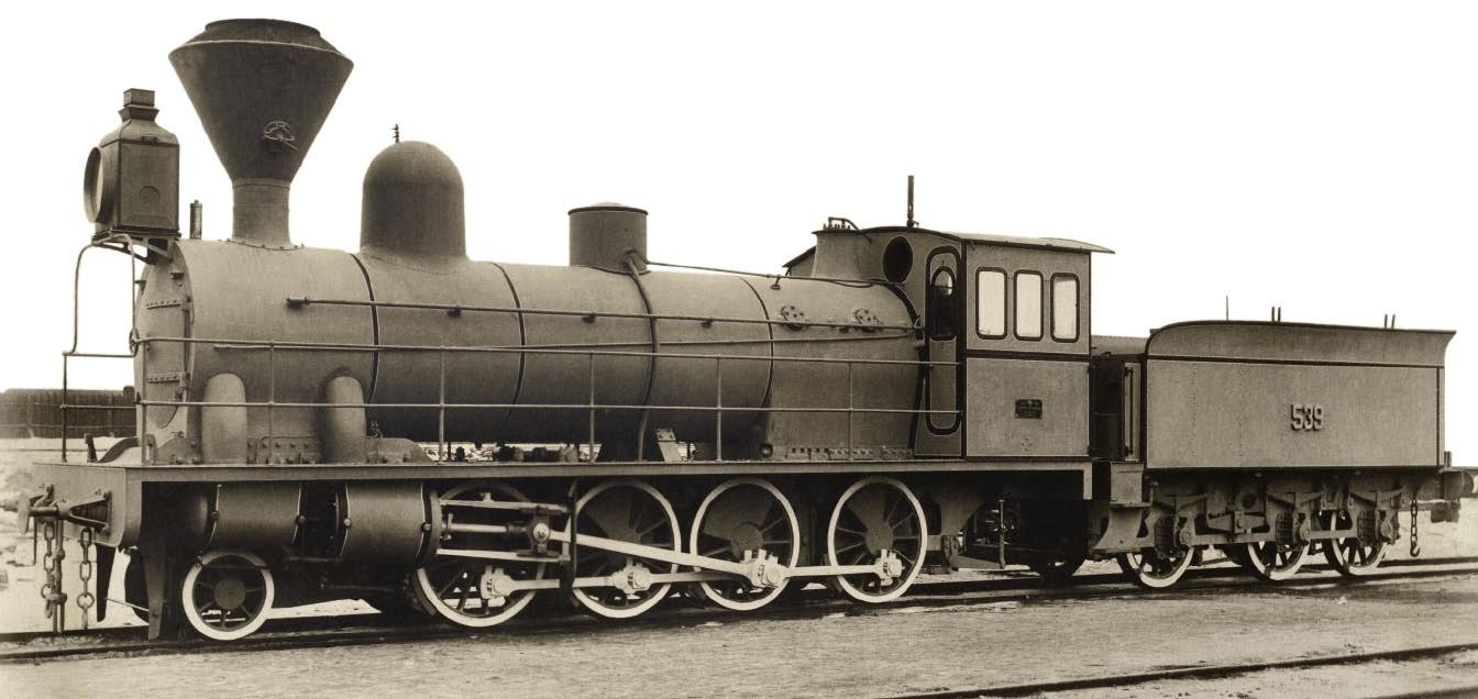 Паровоз серии Р